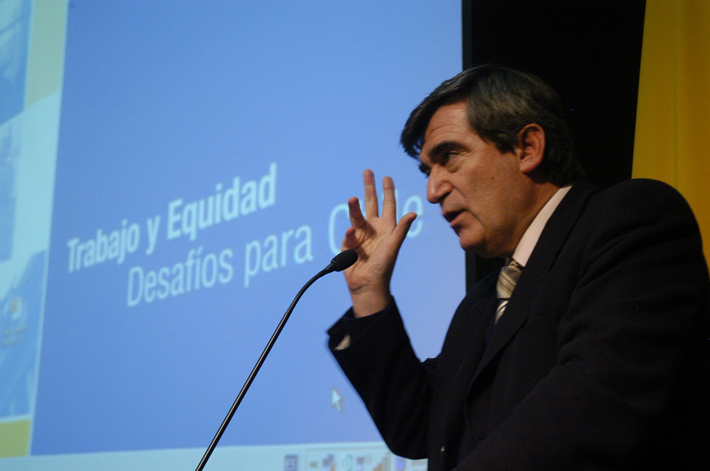 En la jornada intervinieron, entre otros, el presidente del Consejo Asesor Presidencial Trabajo y Equidad, Patricio Meller; los economistas UC Fernando Coloma y Salvador Valdés; los senadores Andrés Allamand y Camilo Escalona; el decano de la Facultad de Derecho de la Universidad Alberto Hurtado, Pedro Irureta, y el director social del Hogar de Cristo, Benito Baranda.